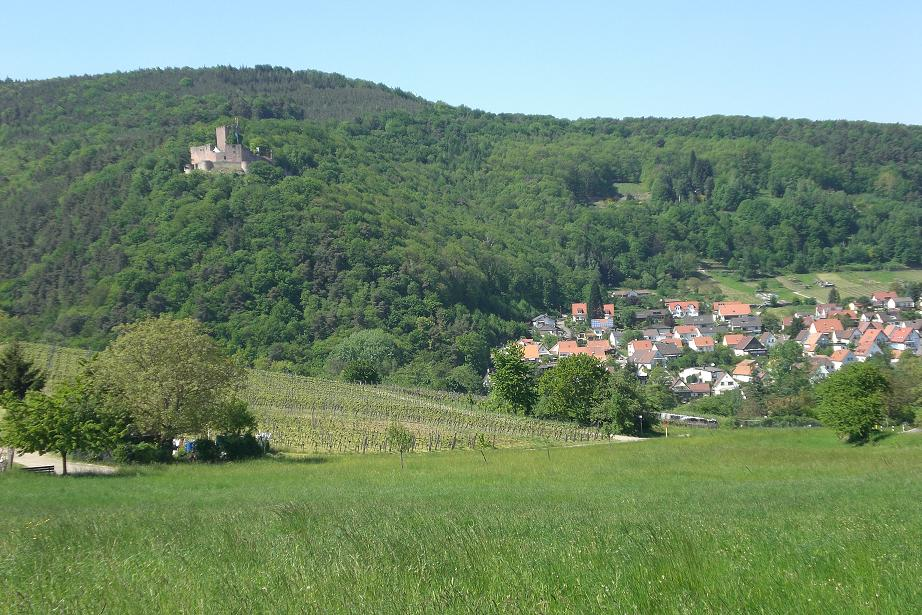 Lage Burg Landeck oberhalb Klingenmünster